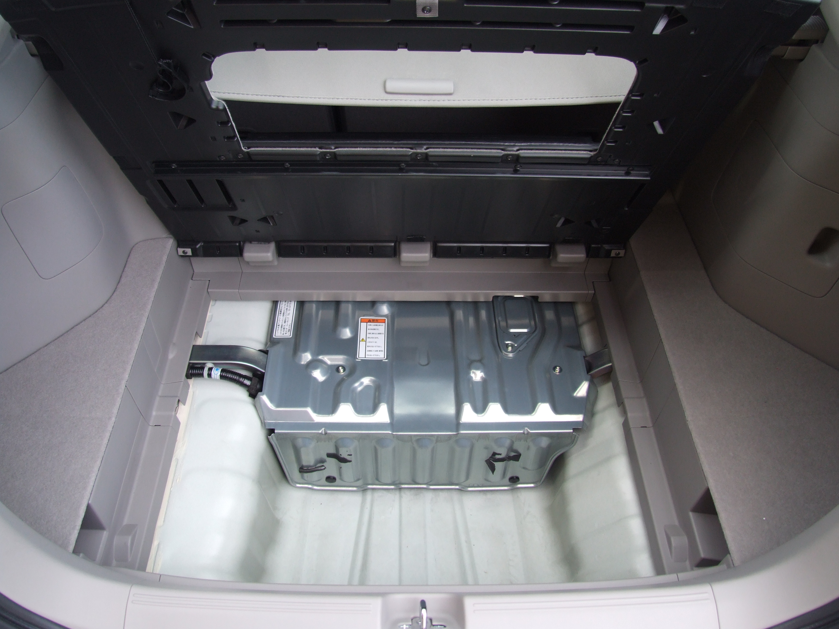 インサイト後部に搭載している蓄電池